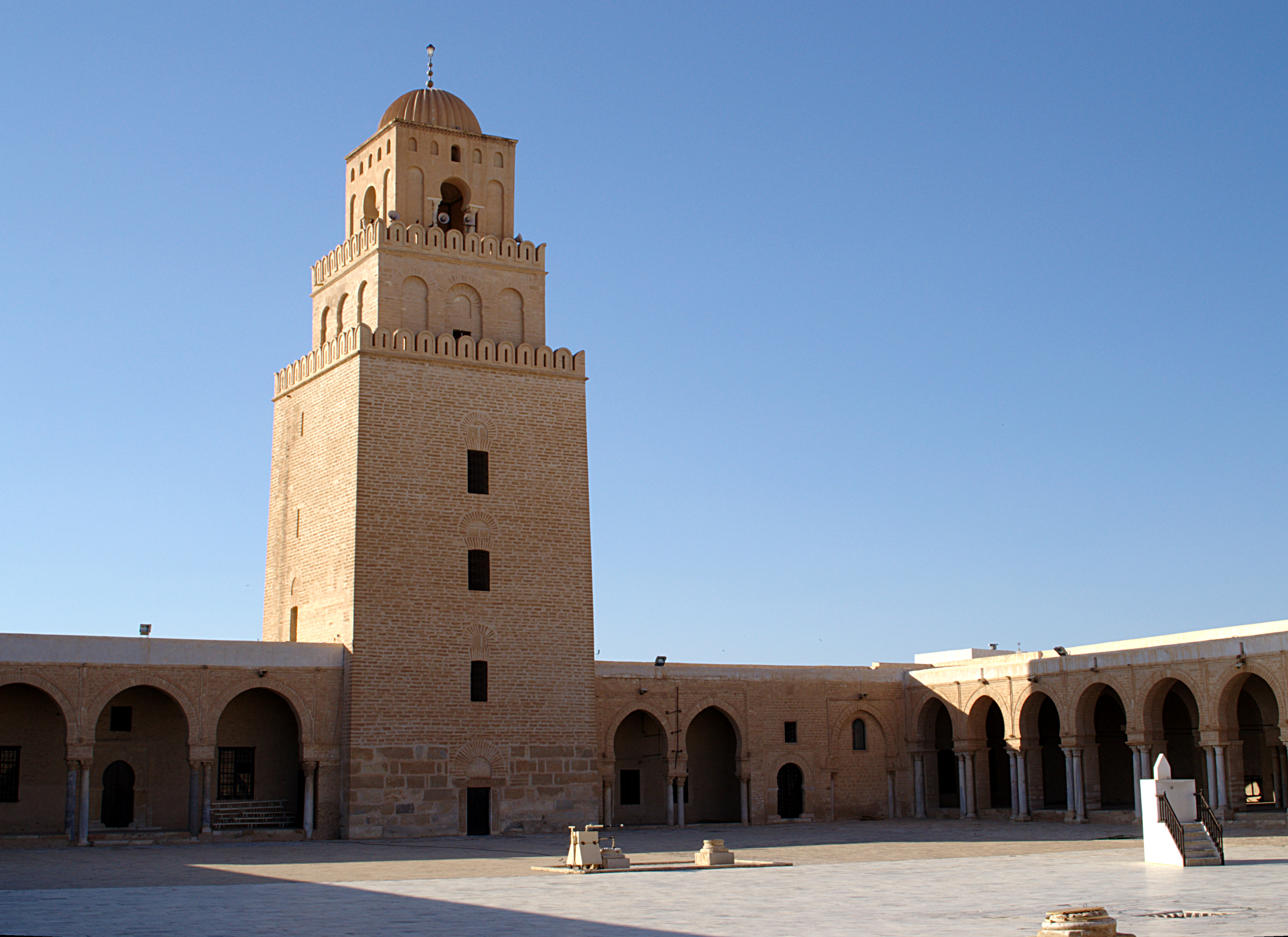 Grande Mosquée (Sidi Okba), Kairouan. Vue du minaret depuis la cour.